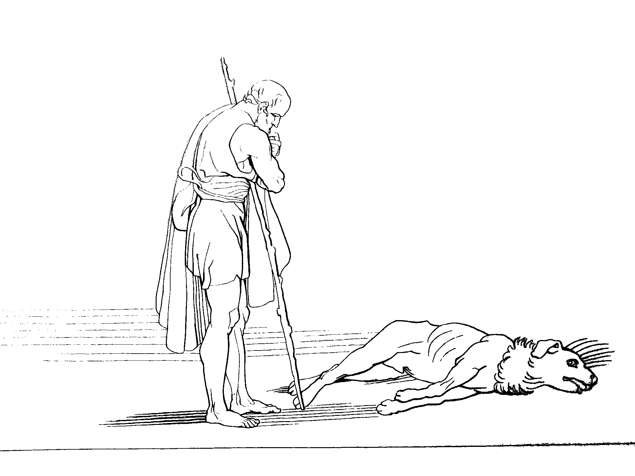 Argos reconnait son maitre Ulysse et meurt de joie. Illustration de John Flaxman pour l'Odyssée, 1835.